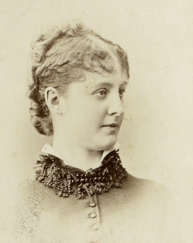 "Album de portraits cartes de visite ayant appartenu à Édouard Manet", Date d'édition : 1860-1883, Format : 1 album de 193 photogr. pos. sur papier albuminé, d'après des négatifs sur verre au collodion ; 31 x 24 cm (vol.), Source : Bibliothèque nationale de France, département Estampes et photographie, 4-NA-115